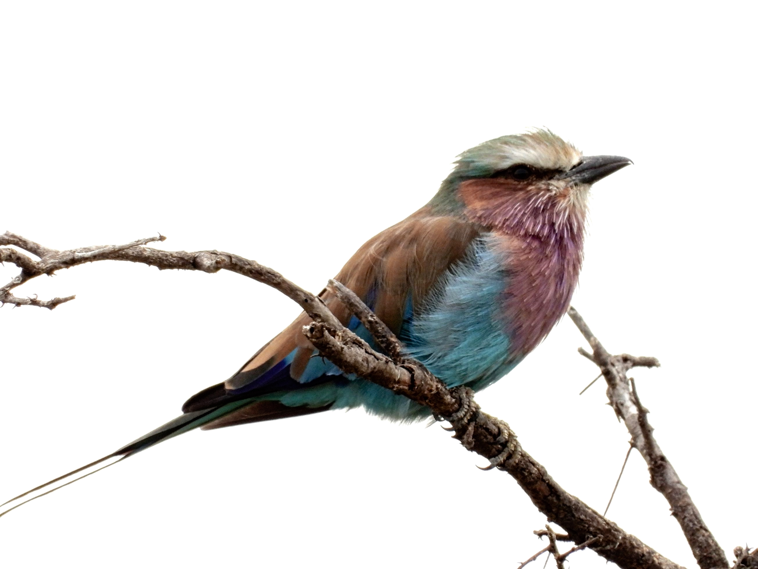 La Carraca lila es un símbolo nacional en Kenia